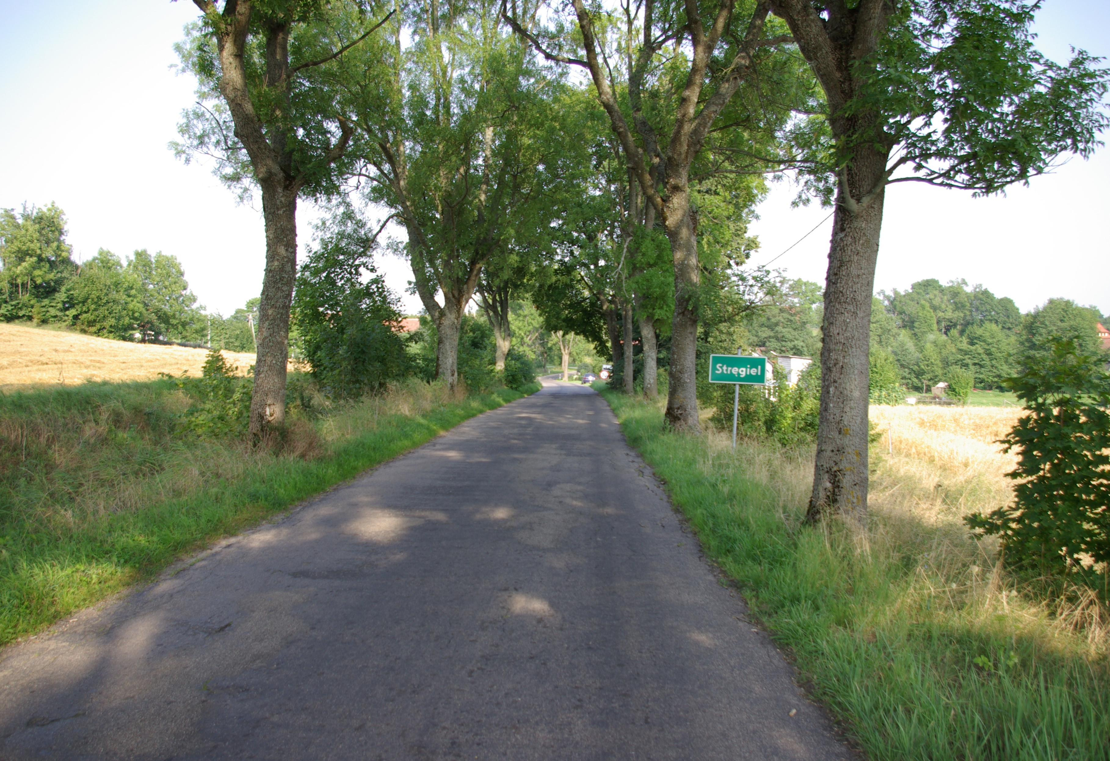 Stręgiel (dt. Groß Strengeln) in der Gemeinde Węgorzewo (dt. Angerburg)